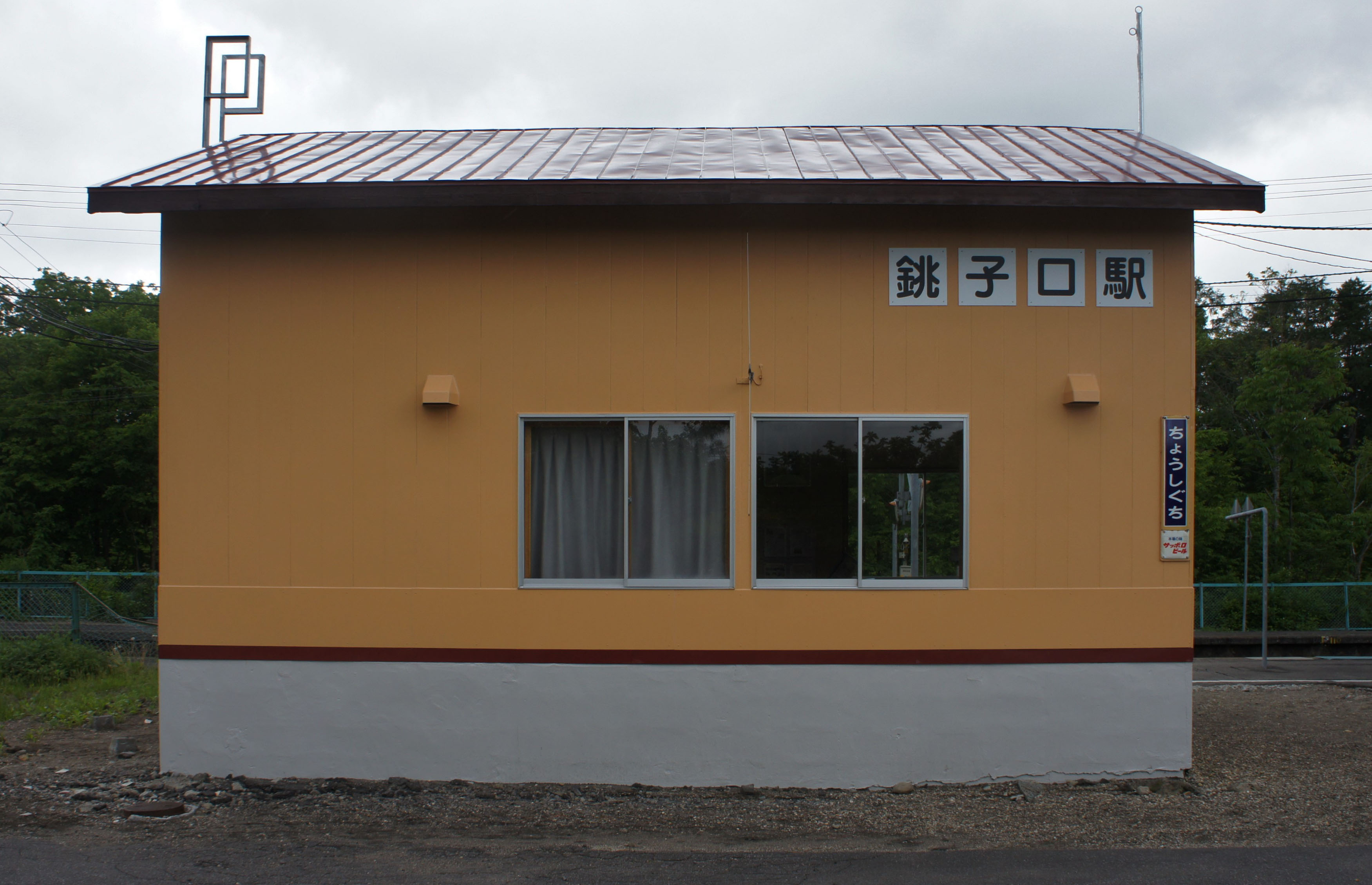 JR函館本線・銚子口駅の駅舎